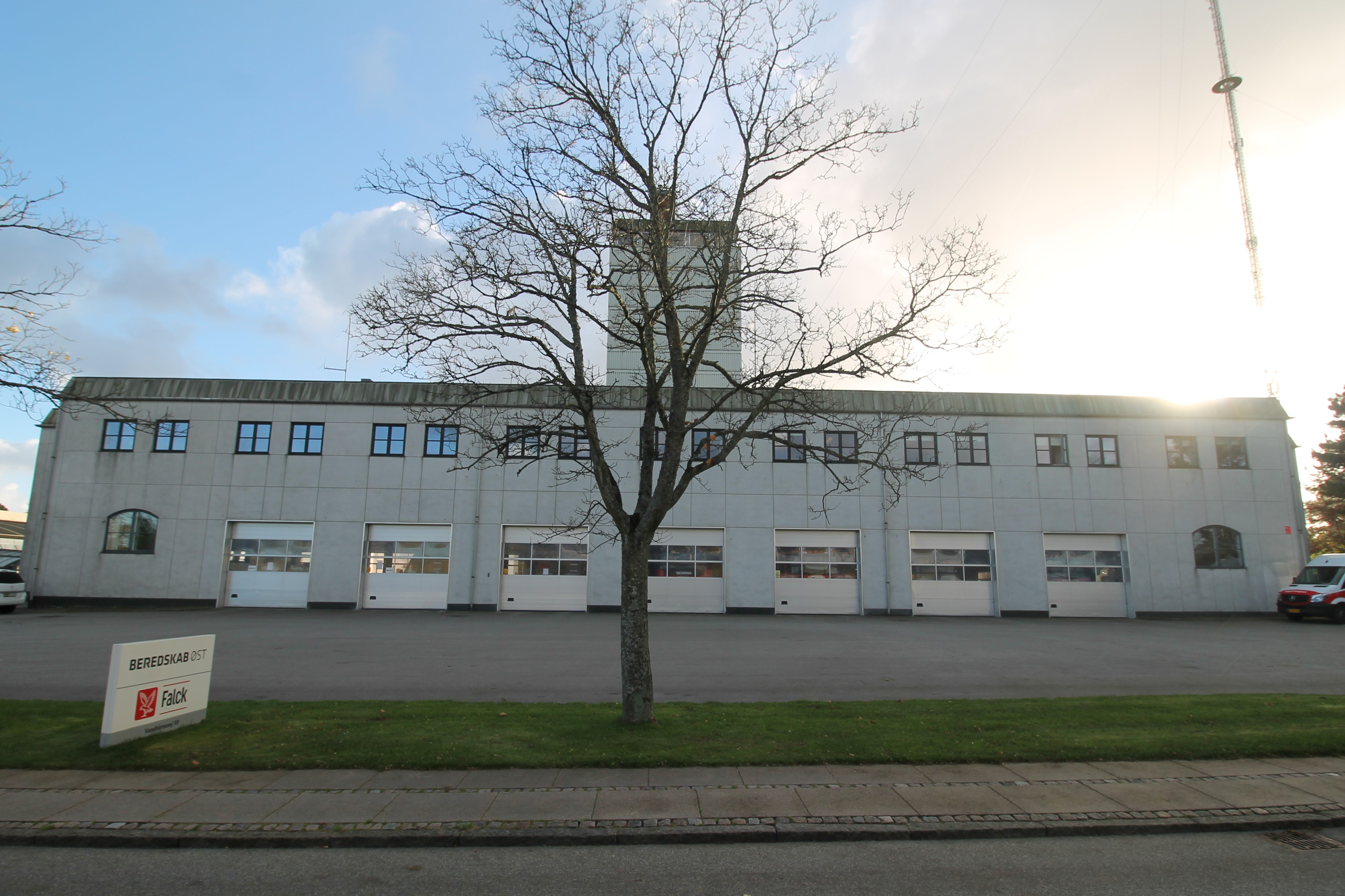 Gladsaxe Brandvæsen